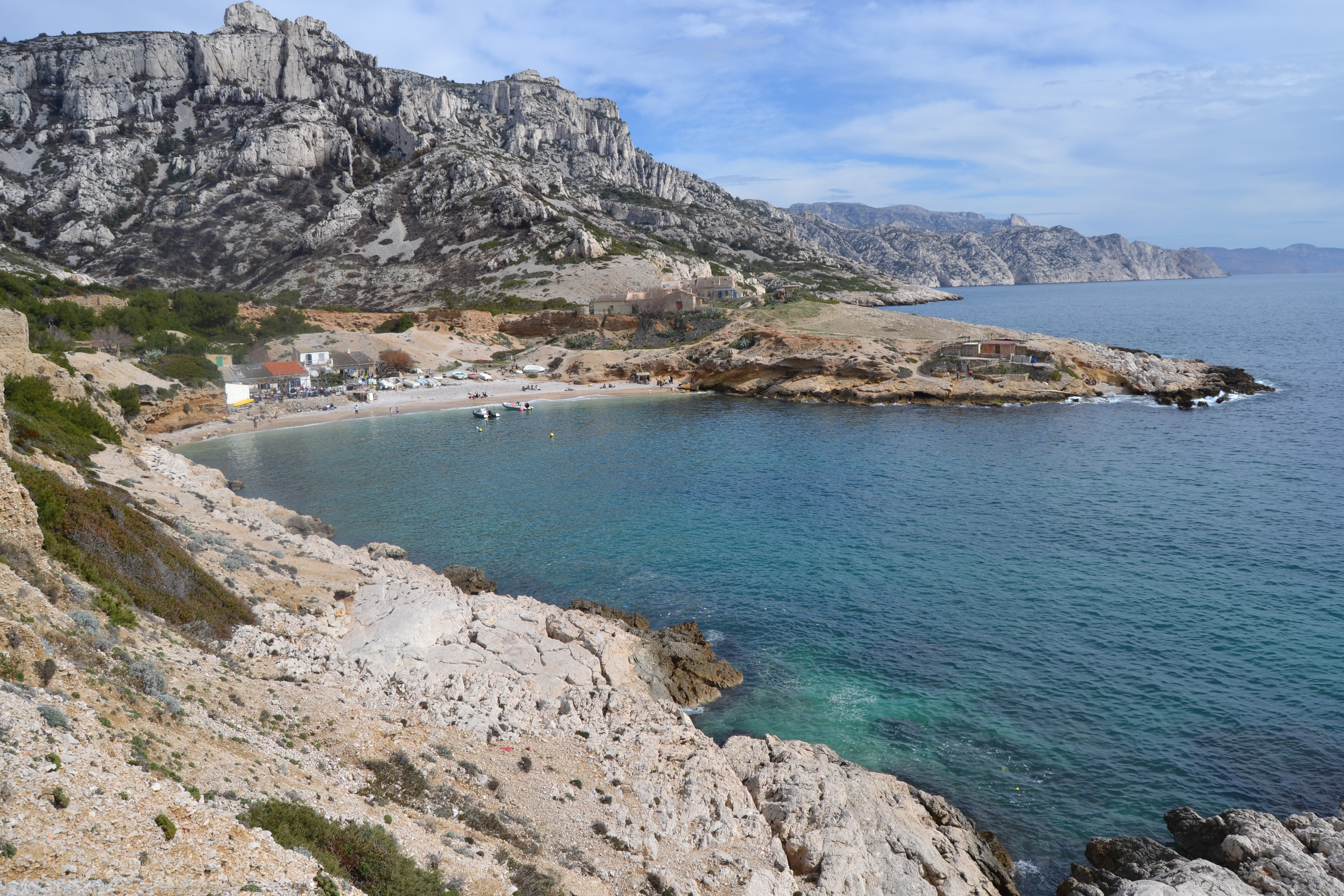 La calanque de Marseilleveyre, dans les Calanques de Marseille